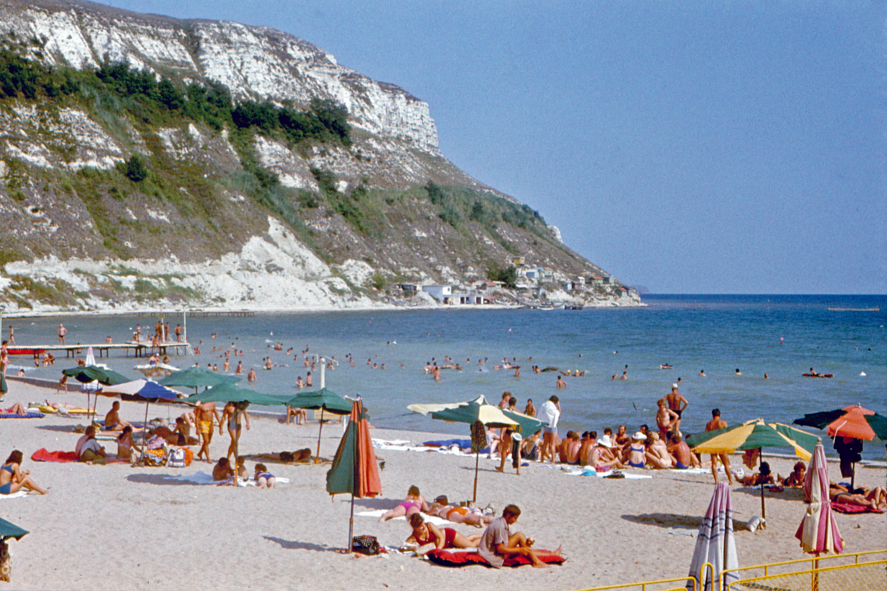 Die östliche Steilküste von Kawarna, im Hintergrund ist der südlichste Zipfel des Kap Kaliakras zu sehen. Vorn das Strandbad mit Badegästen, vorwiegend aus den sozialistischen Ländern.